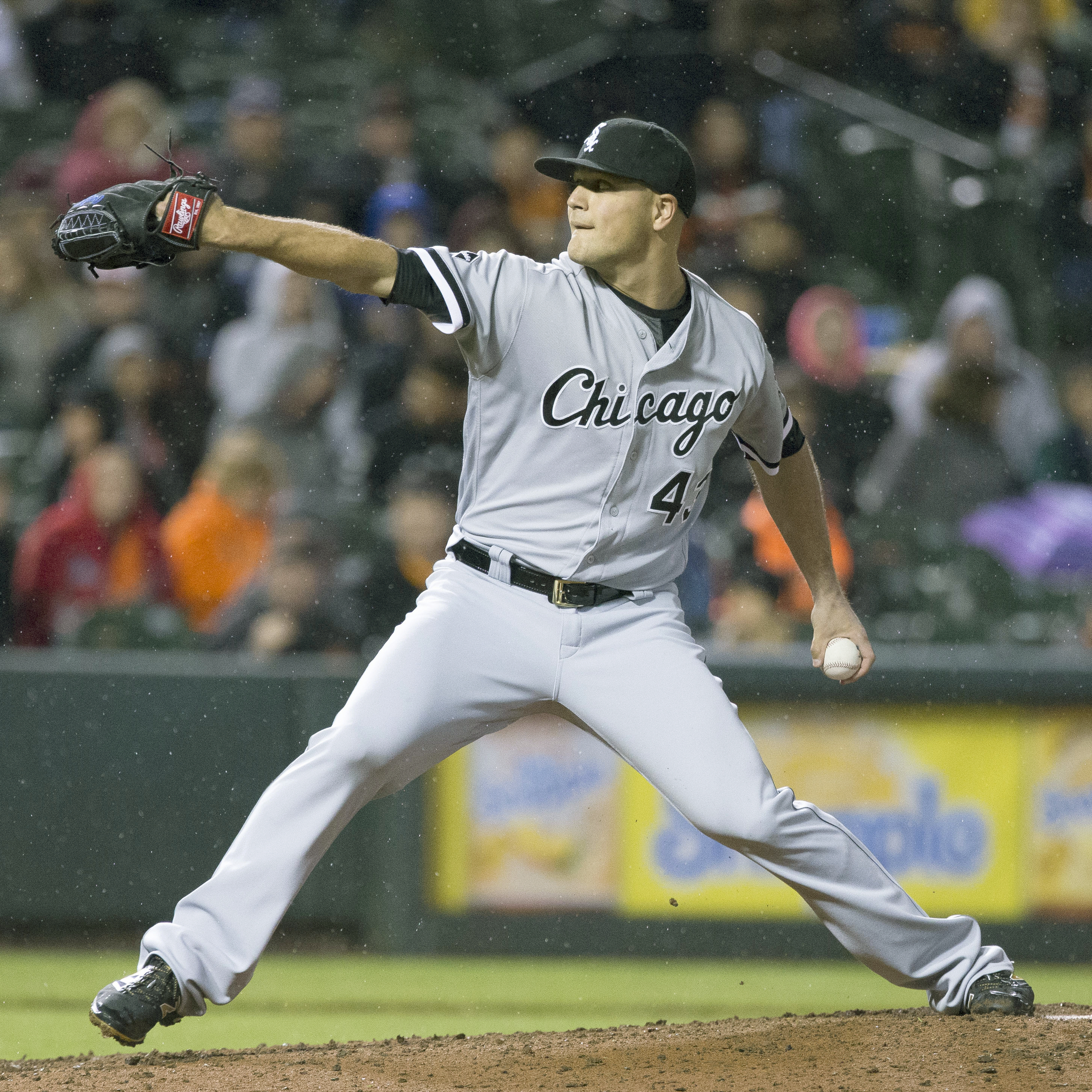 Dan Jennings